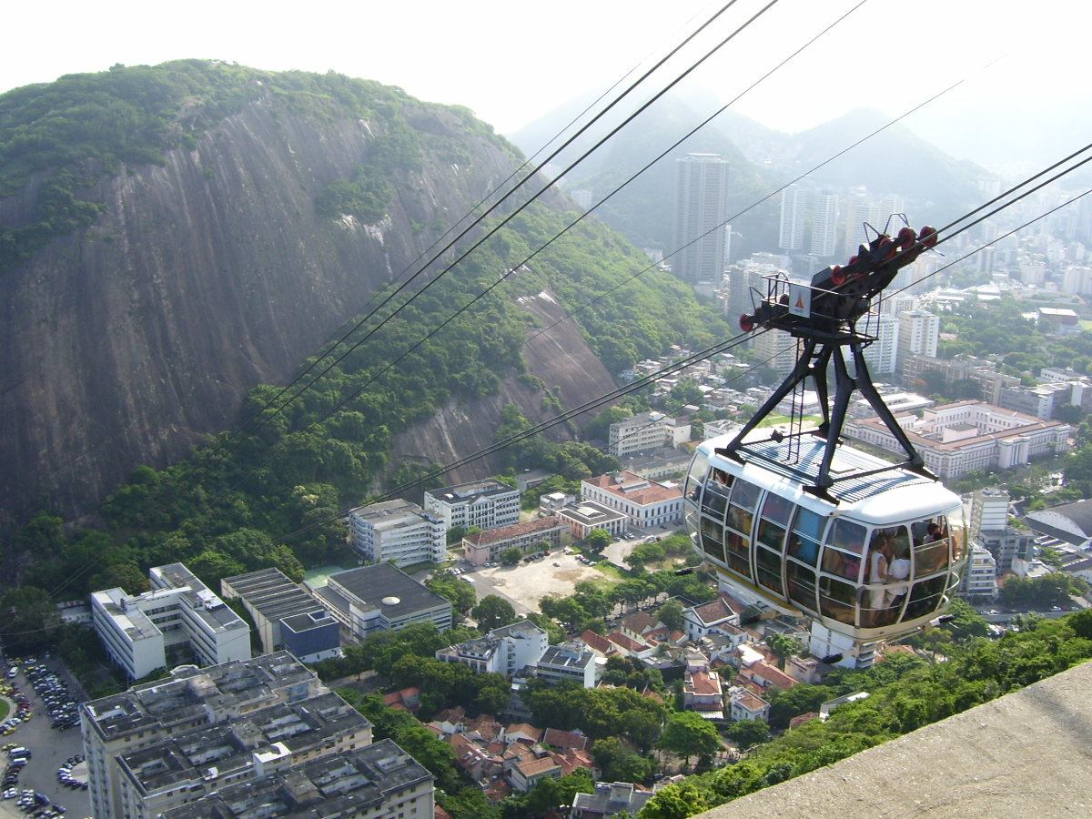 Bondinho descendo o Morro da Urca em direção à Praia Vermelha, com prédios da Zona Sul do Rio de Janeiro ao fundo